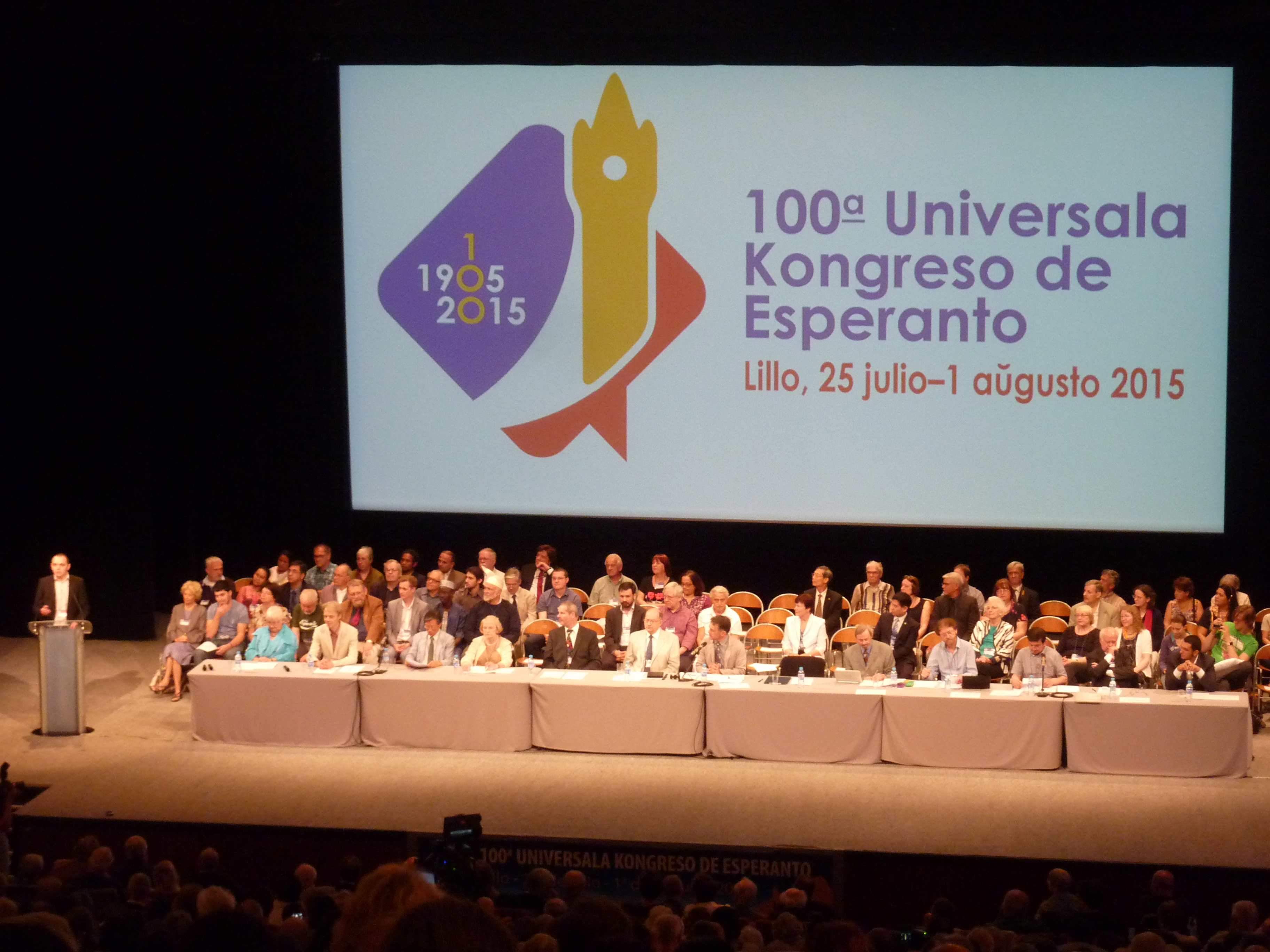 Solena malfermo de la 100-a Universala Kongreso de Esperanto en Lille (Francio)